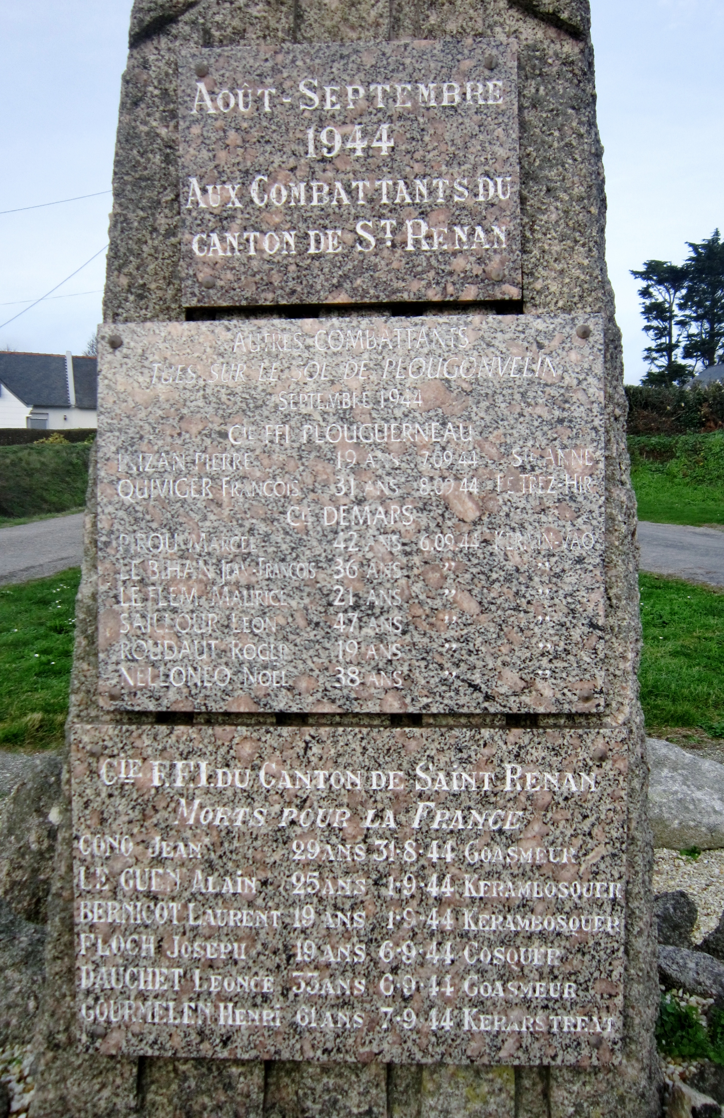 La stèle en mémoire des combattants FFI du canton de Saint-Renan (au Cosquer en Plougonvelin).